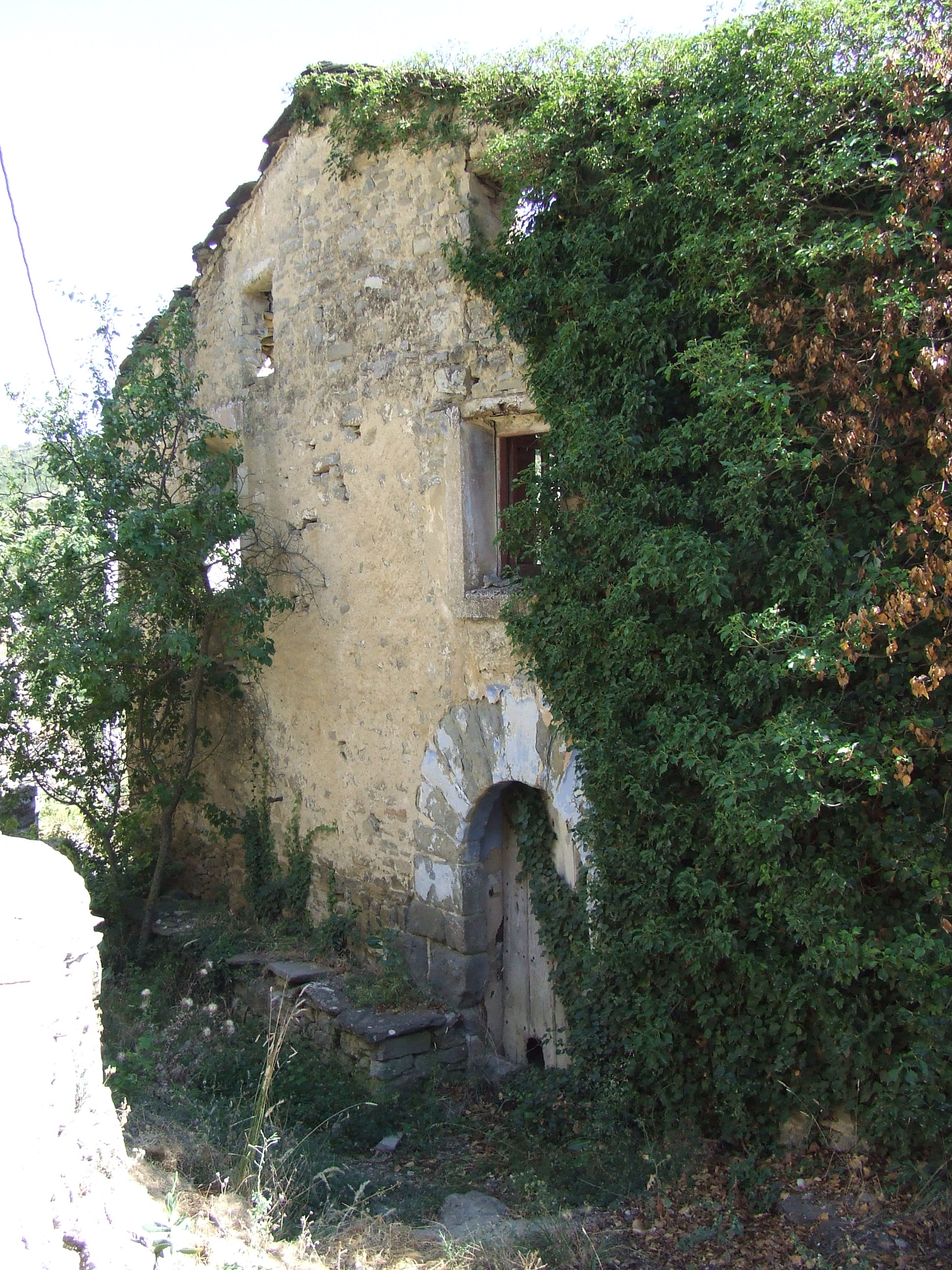 Una casa del Meüll (Mur, Castell de Mur, Pallars Jussà)